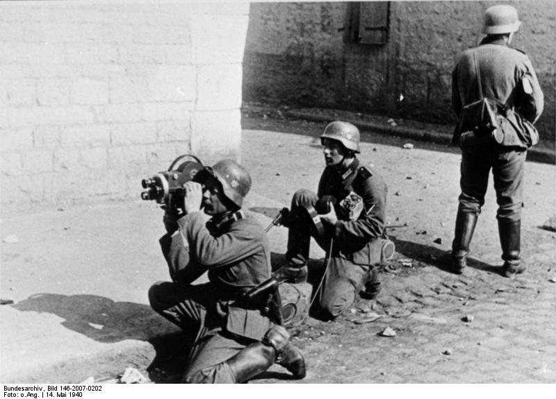 Heeres-Filmstelle Bildabteilung: Datum: 14.5.40 Ort: Givet Filmtrupp bei der Arbeit, Strasse wird gesichert.